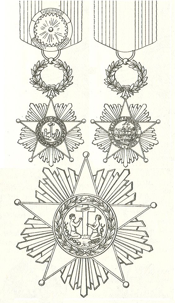 Scan van Blz. 207 en 208 van het boek "Handbuch der Ritter- und Verdienstorden " uitgegeven 1893 door Weber.Tekening van de in 1902 overleden Maximilian Gritzner. Robert Prummel 10 jul 2008 16:40 (CEST)